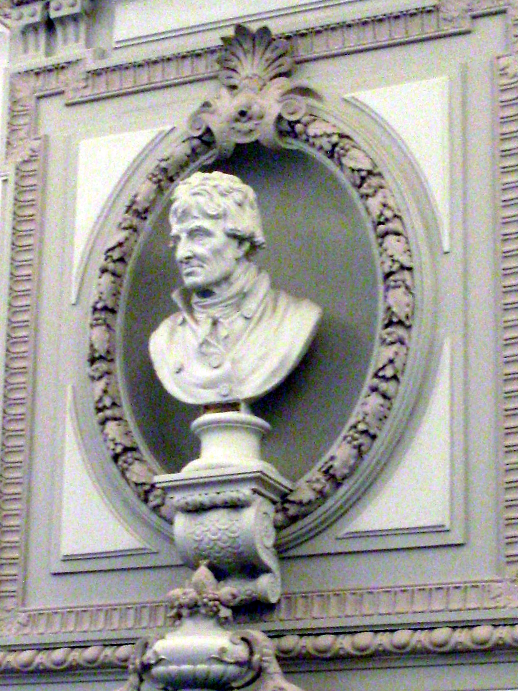 Buste de François Lucas dans le Palais Niel à Toulouse